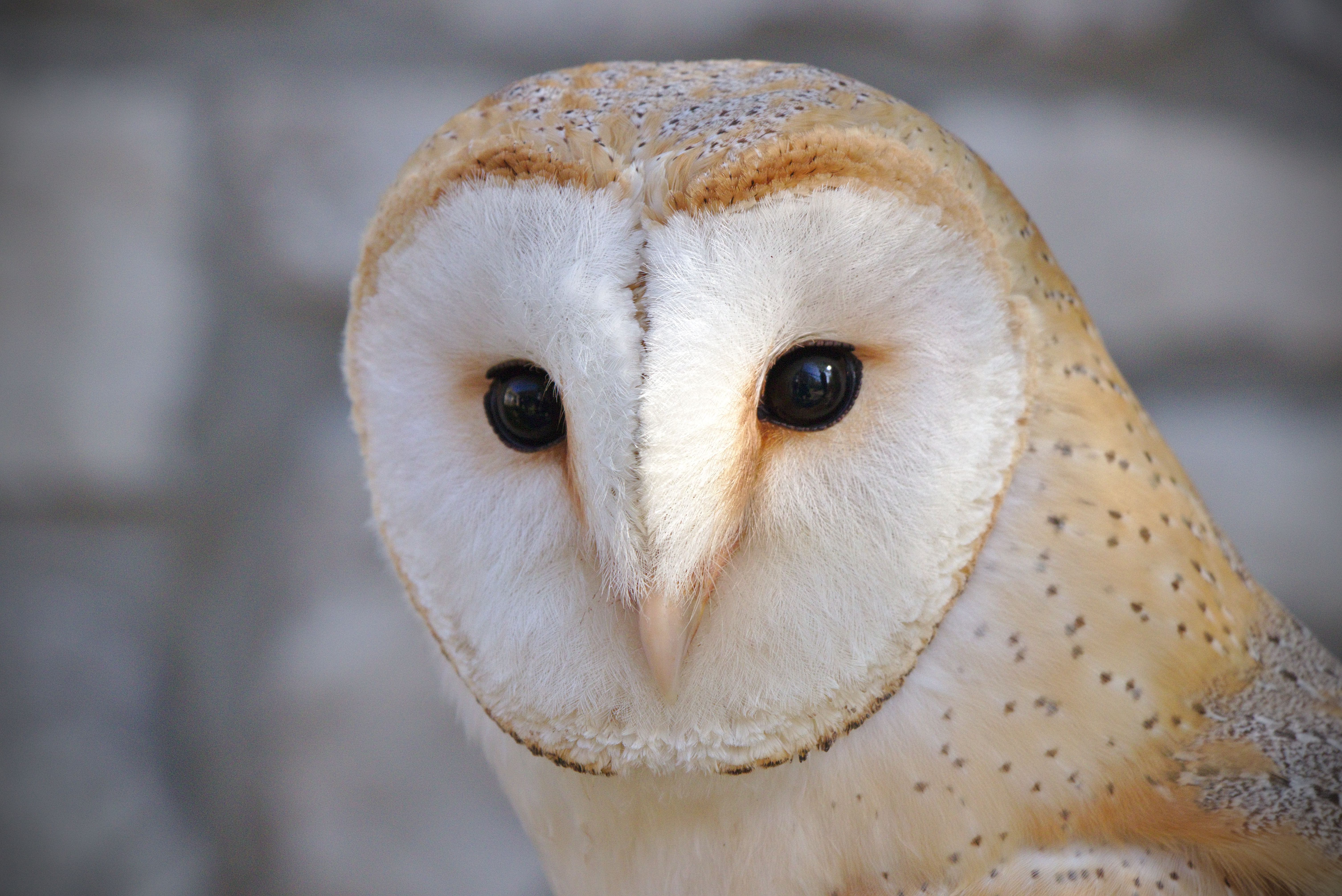 Tête d'une (Tyto alba) à la fauconnerie Sky Hunter de Flémalle en Belgique.